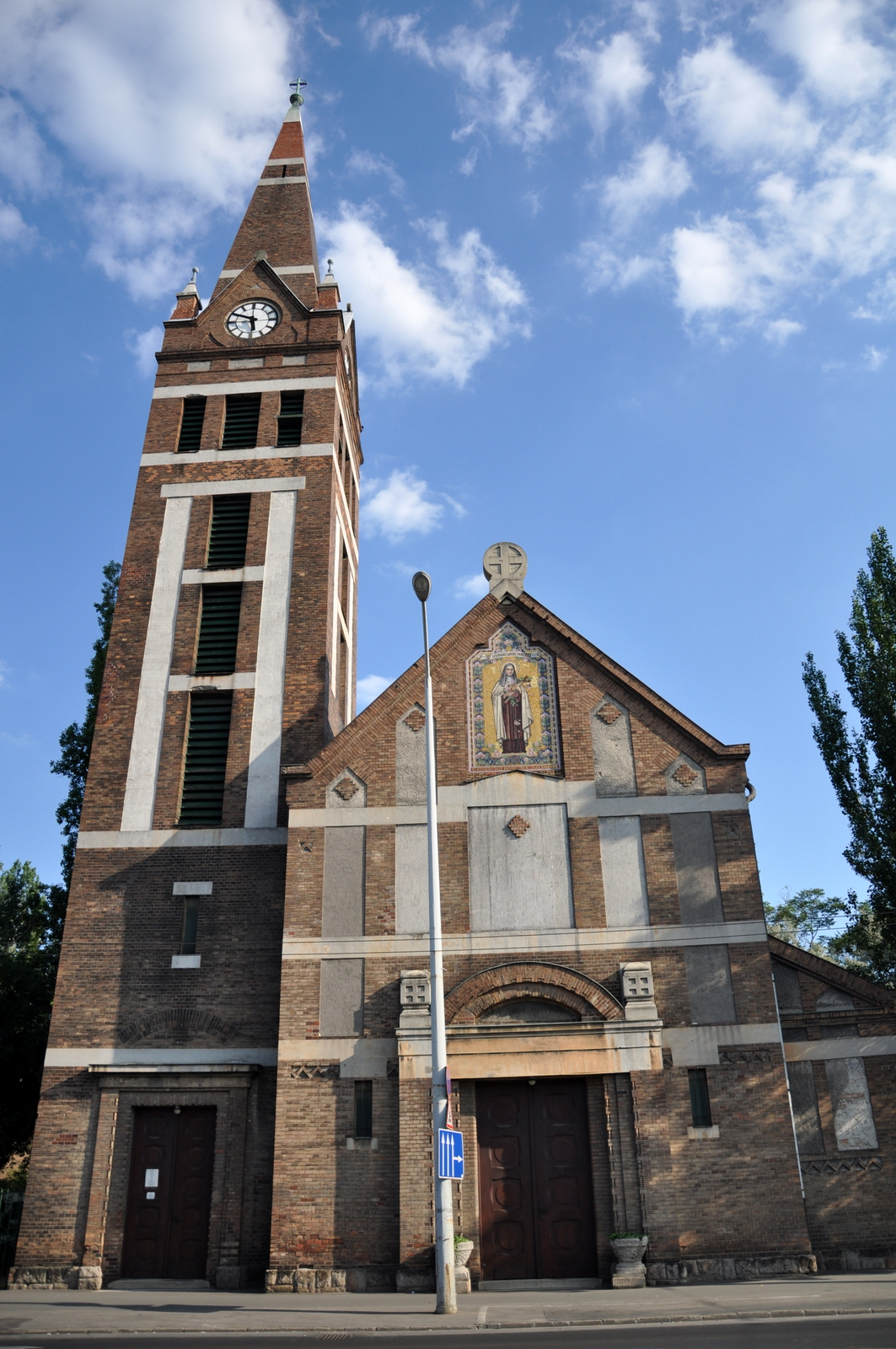 Saint Thérèse of Lisieux Church, Kerepesi street, Budapest